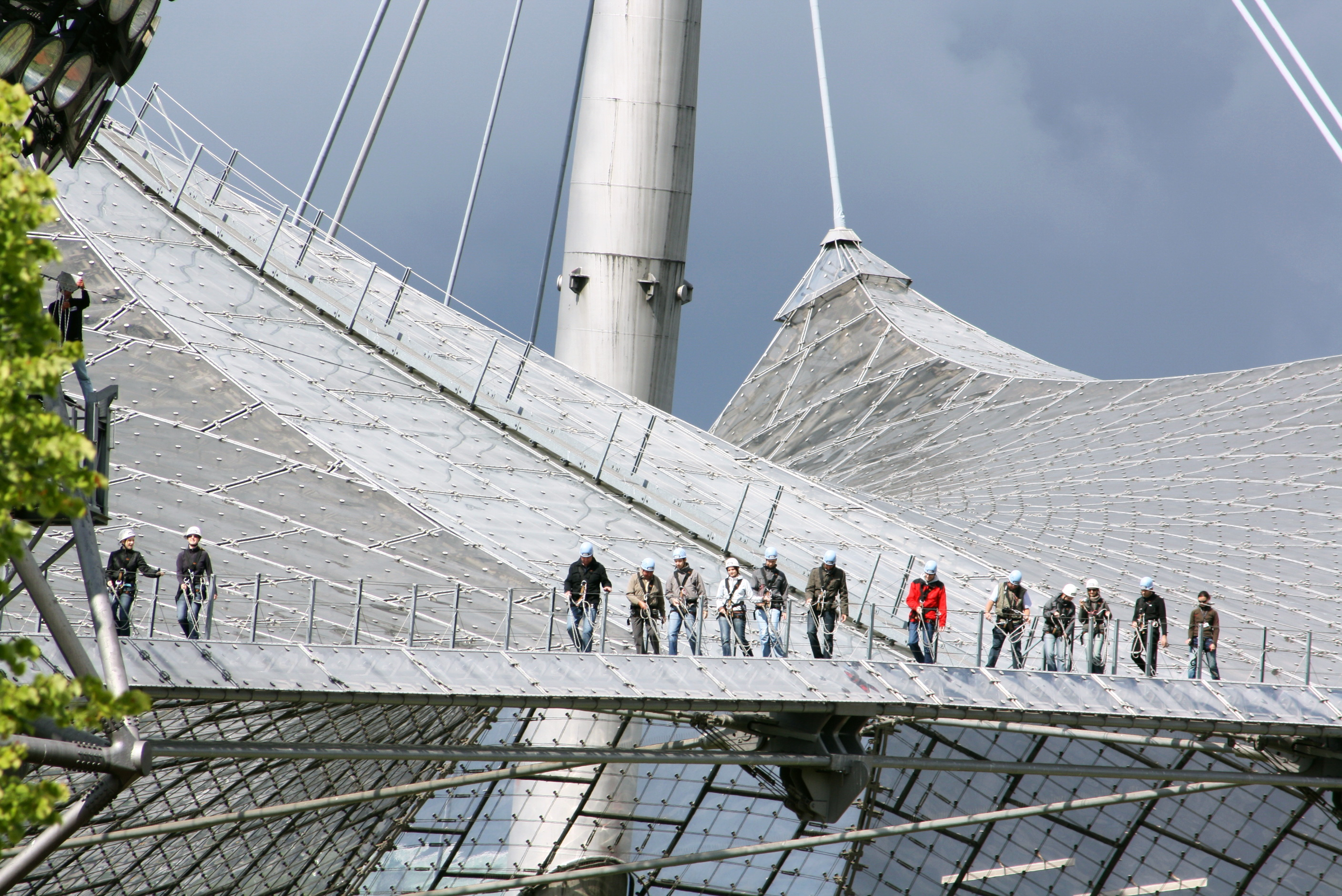 Besichtigung der Dachkonstruktion des Olympia Stadions München mit Begehung.